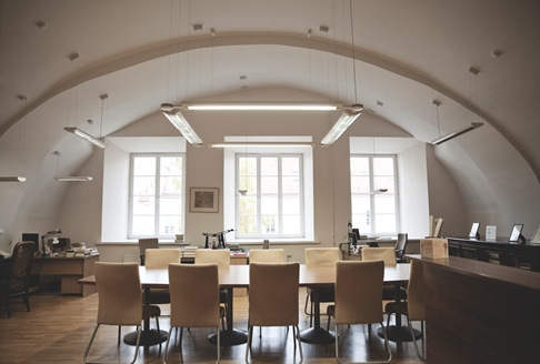 Retų spaudinių skaitykla